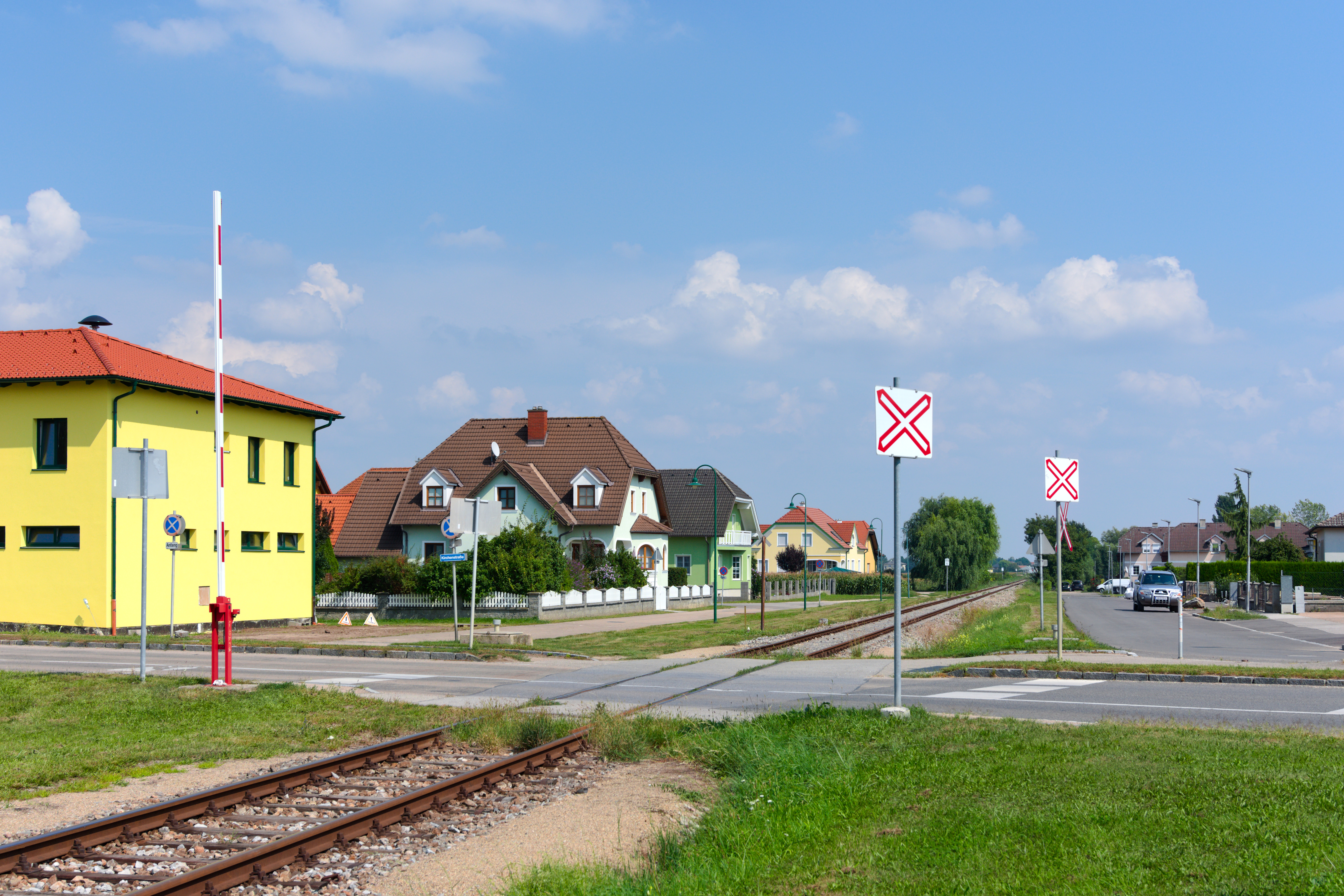 Eisenbahnkreuzung bei km 155,742 an der Pulkautal in Alberndorf im Pulkautal. Die nördliche Bereich der EK wird bei einer Zugfahrt mit einem händisch betätigten Halbschranken gesichert, auf der anderen Seite steht ein Posten.